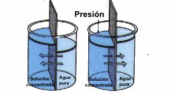 Français cadien: Osmose inversée